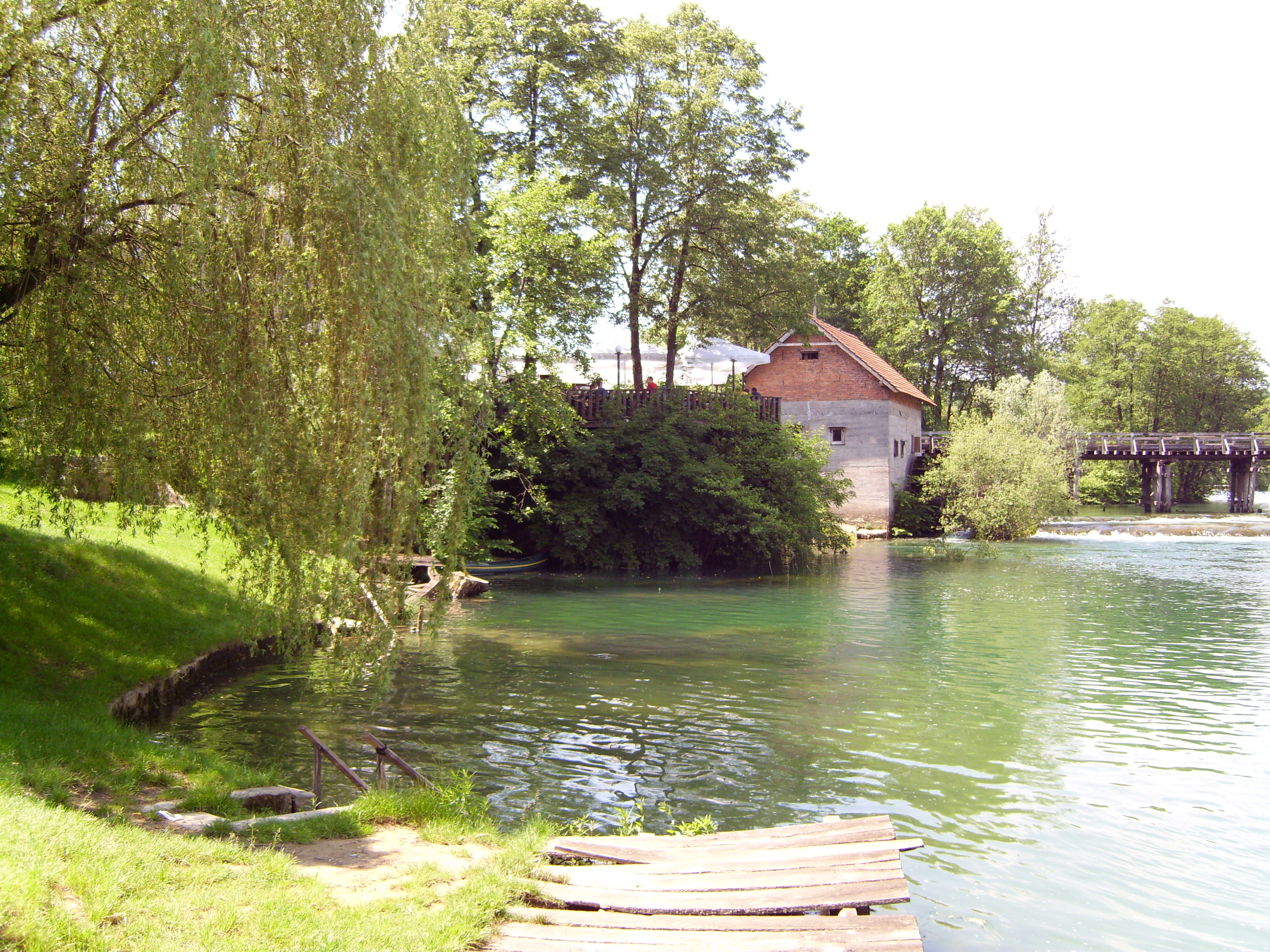 An der Brücke in Mreznica- HR - Croatia